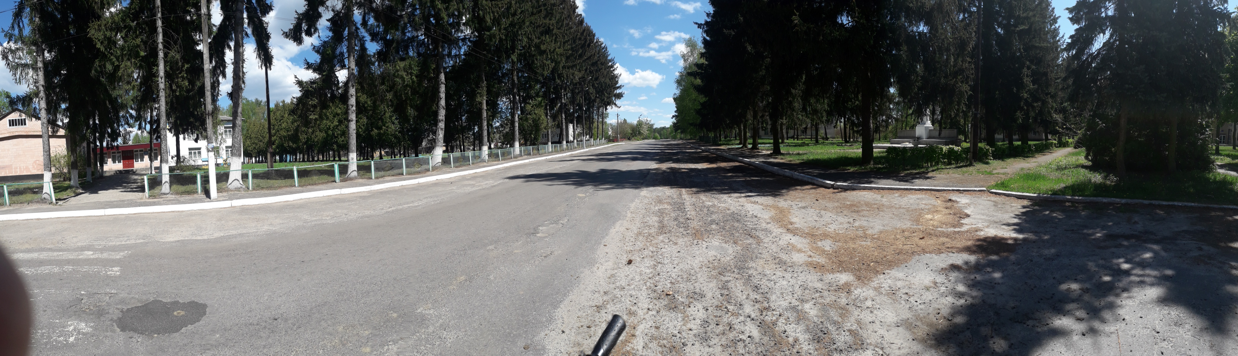 Центр села Боровичі.jpg.